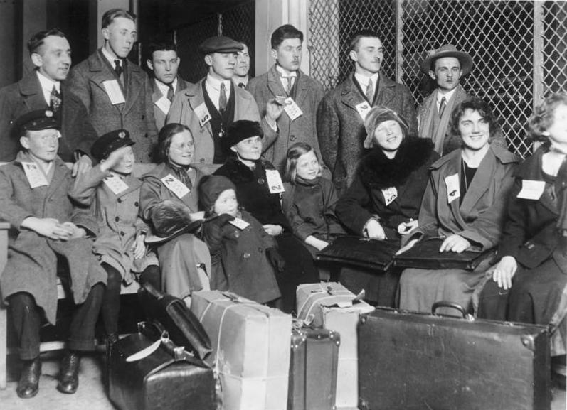 USA-Einwanderer auf Ellis Island ADN-Bildarchiv USA 1931 Auf der Einwanderungsinsel Ellis Island vor New York warten mit Nummern versehene Einwanderer auf ihr weiteres Schicksal. 3408-31 [Scherl Bilderdienst]